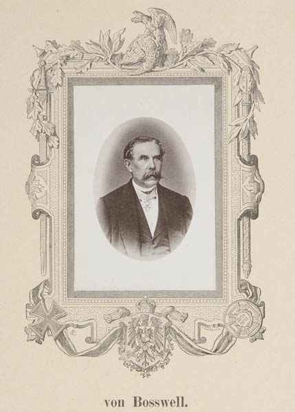 Ferdinand Robert Heinrich Alexander von Bosswell (* 4. September 1816 in Nimmersatt; † 11. Juni 1876 in Görlitz), Generalmajor, 1864 Teilnahme am Feldzug gegen Dänemark, Kommandant von Minden